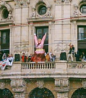 La Marijaia, en la Aste Nagusia de Bilbao, en 2005.